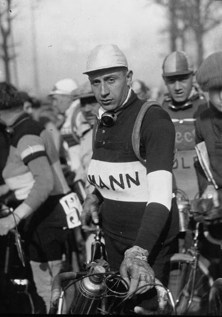 Speicher, cycliste